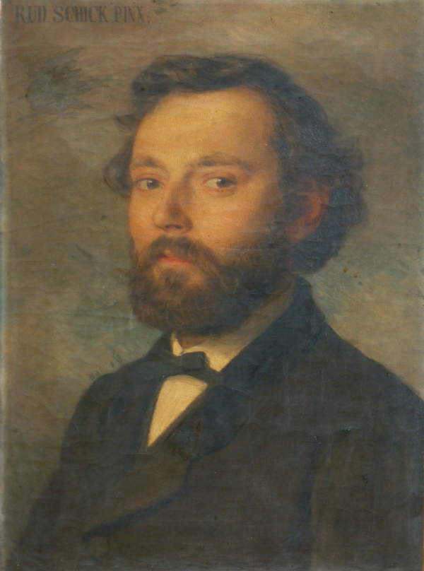 Albert Küppers, Öl auf Leinwand